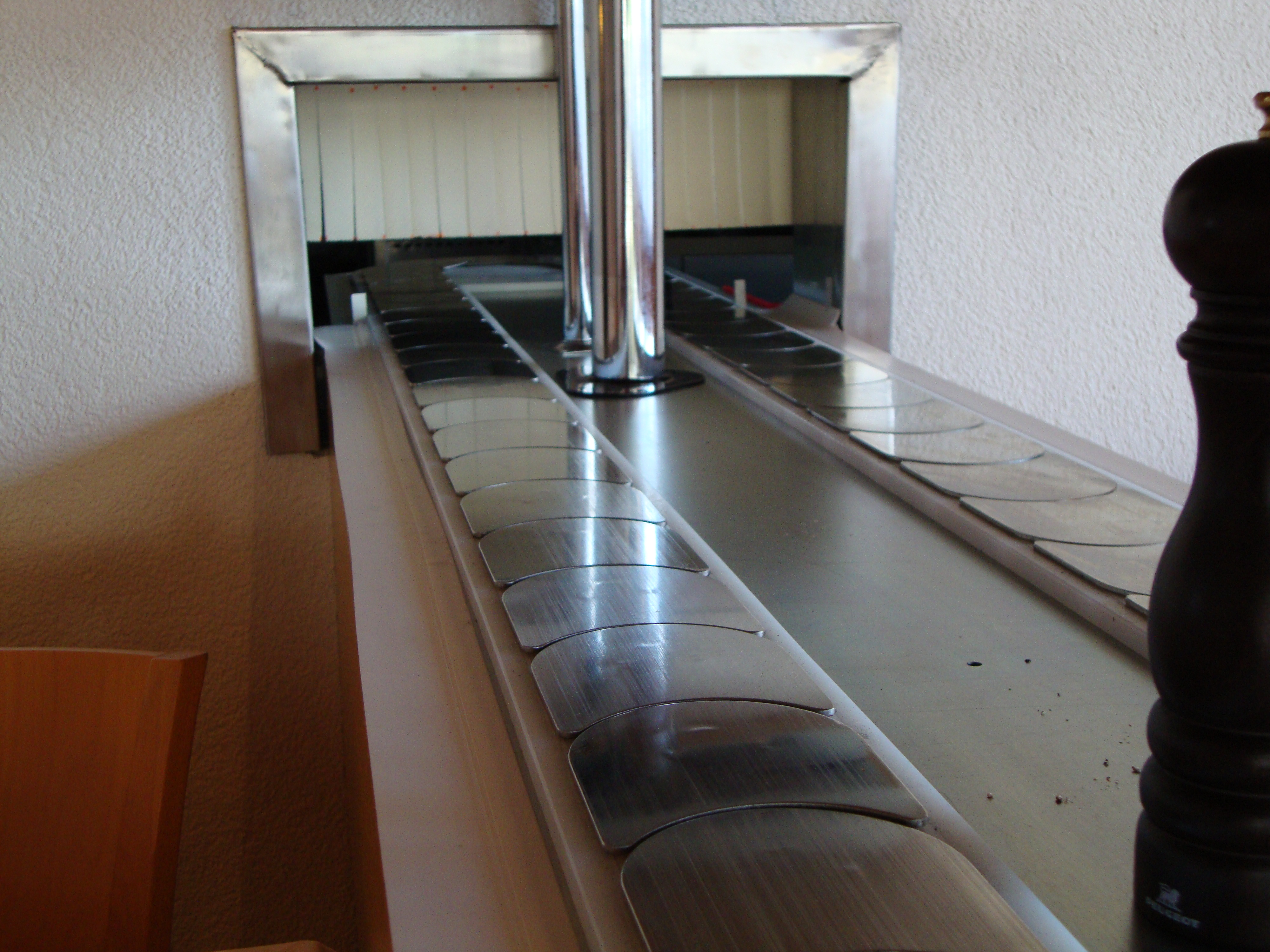 Fest installierter Rotationstransporter, spezialangefertigt für die stationäre Beförderung thematischer Gerichten und Speisen in der Erlebnisgastronomie. SUVA-geprüftes Unikat, für die Erbringung kommerzieller Dienstleistung. (Das Sicherheitskonzept lässt keine Verletzungsgefahr zu: 1. Bewegliche Elemente sind frei von scharfen Kanten. 2. Mechanismen schliessen Textil- oder Haarverwicklung aus.)